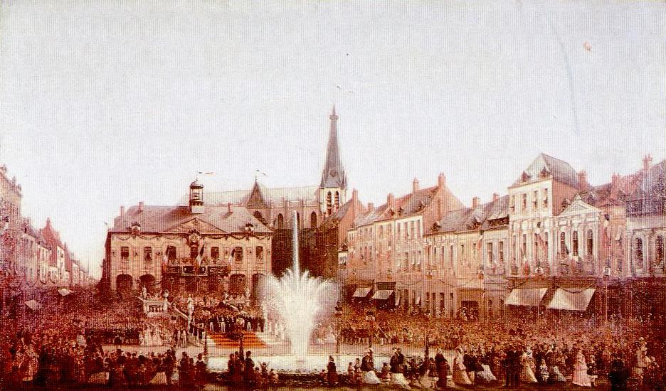 Peinture représentant la Grande Place de Tourcoing, lors de l'inauguration du nouveau réseau hydraulique en 1860.